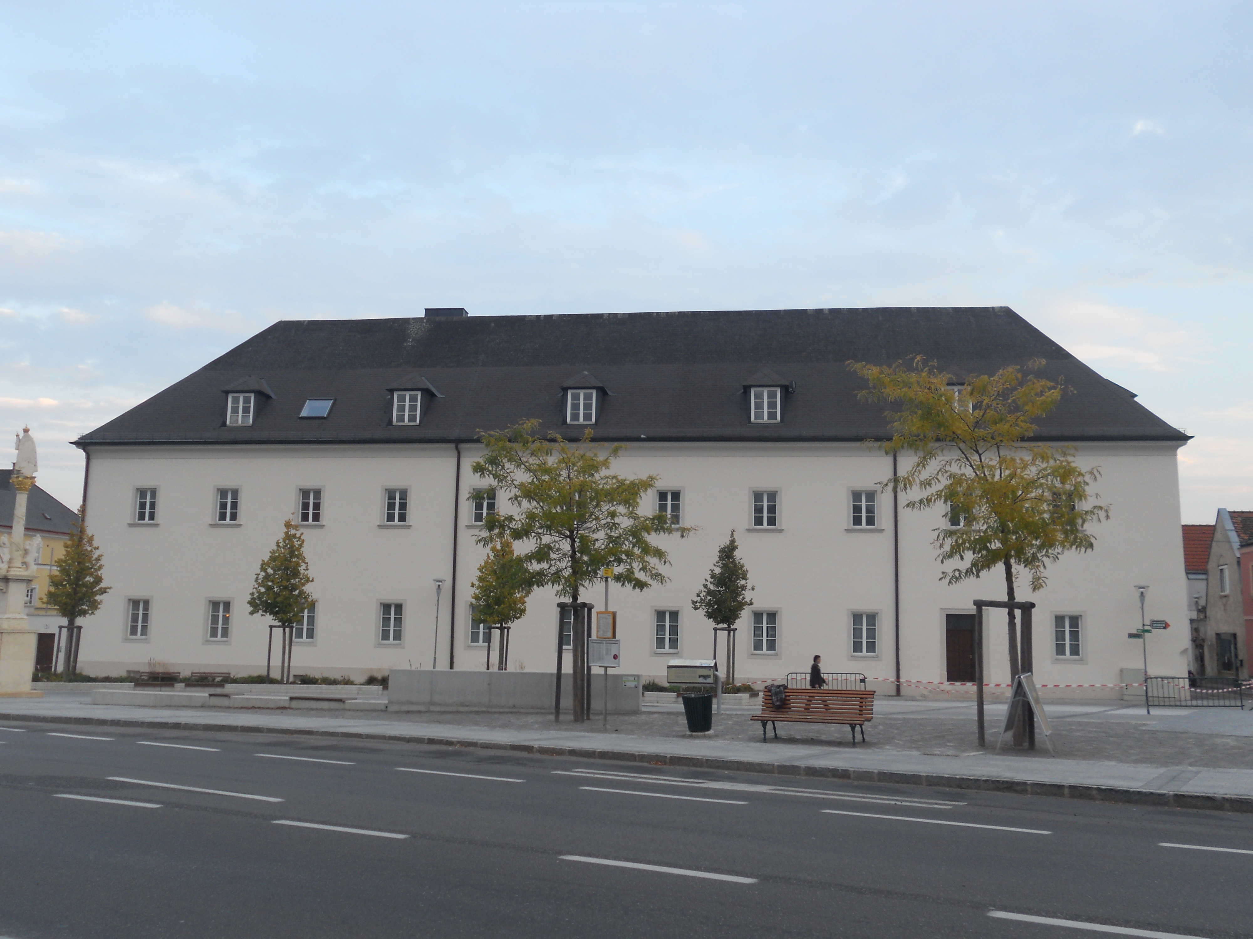 Stiftshof, ehem. Propstei (Haus der Begegnung)